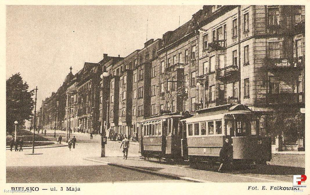 Ulica 3 Maja koło Dworca Głównego i tramwaj linii nr 1 ok. 1950 roku.